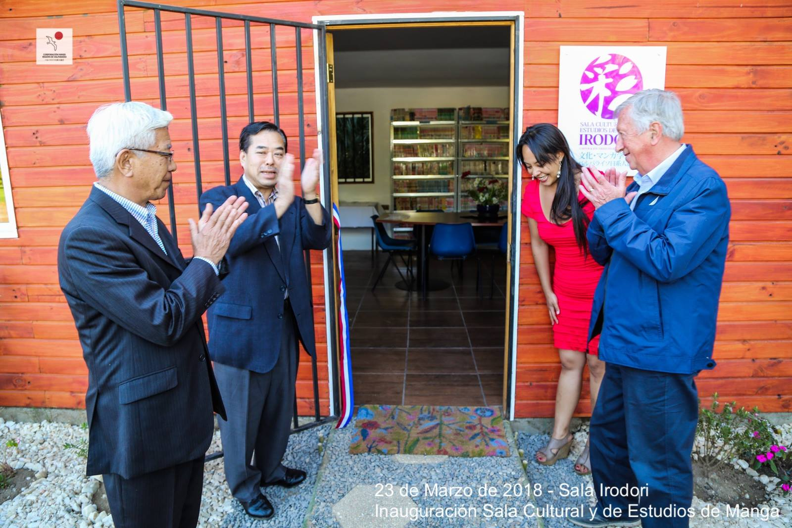 Foto junto al Secretario de la Camara Chileno Japonesa de Comercio, Embajador del Japón, Presidenta de la Corporación Nikkei y el director del Jardín Botánico Nacional